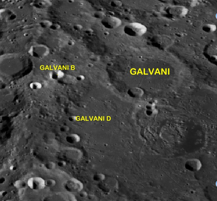 Cráter lunar Galvani. Cráteres satélite. (Imagen LRO)